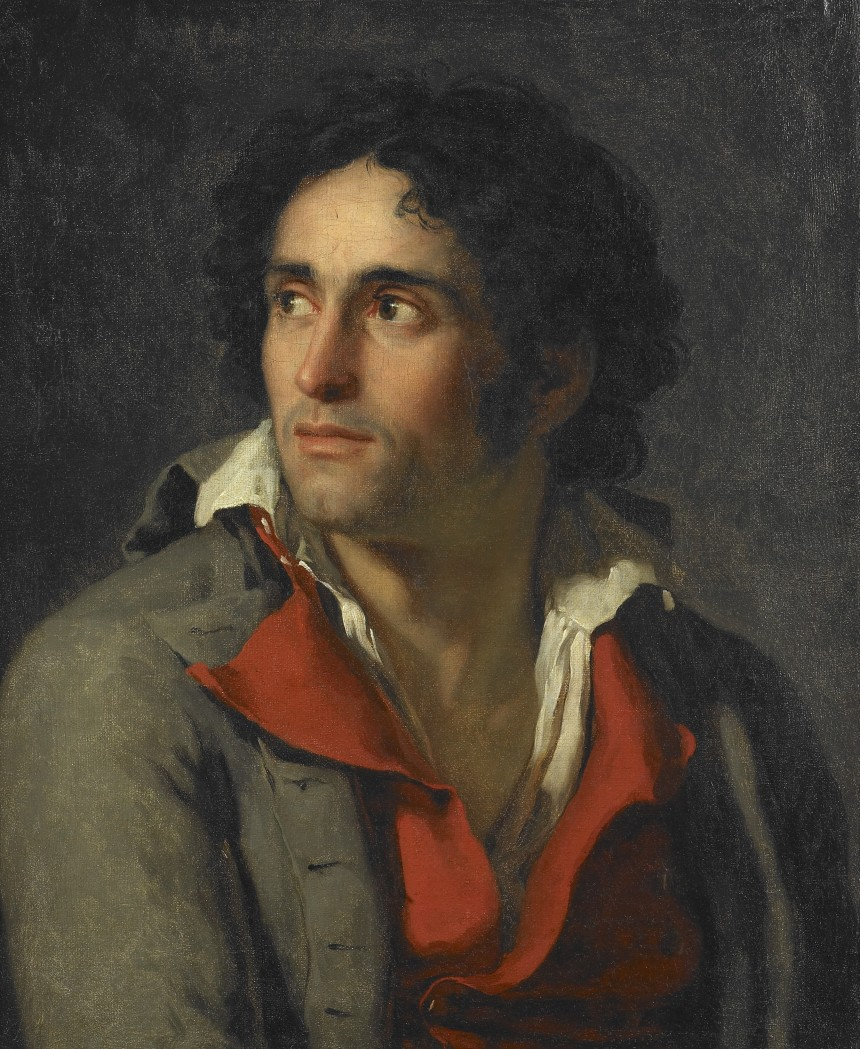 Вартовий художника в ув'язненні. (The Artist’s Jailer - Jacques-Louis David, 1794)